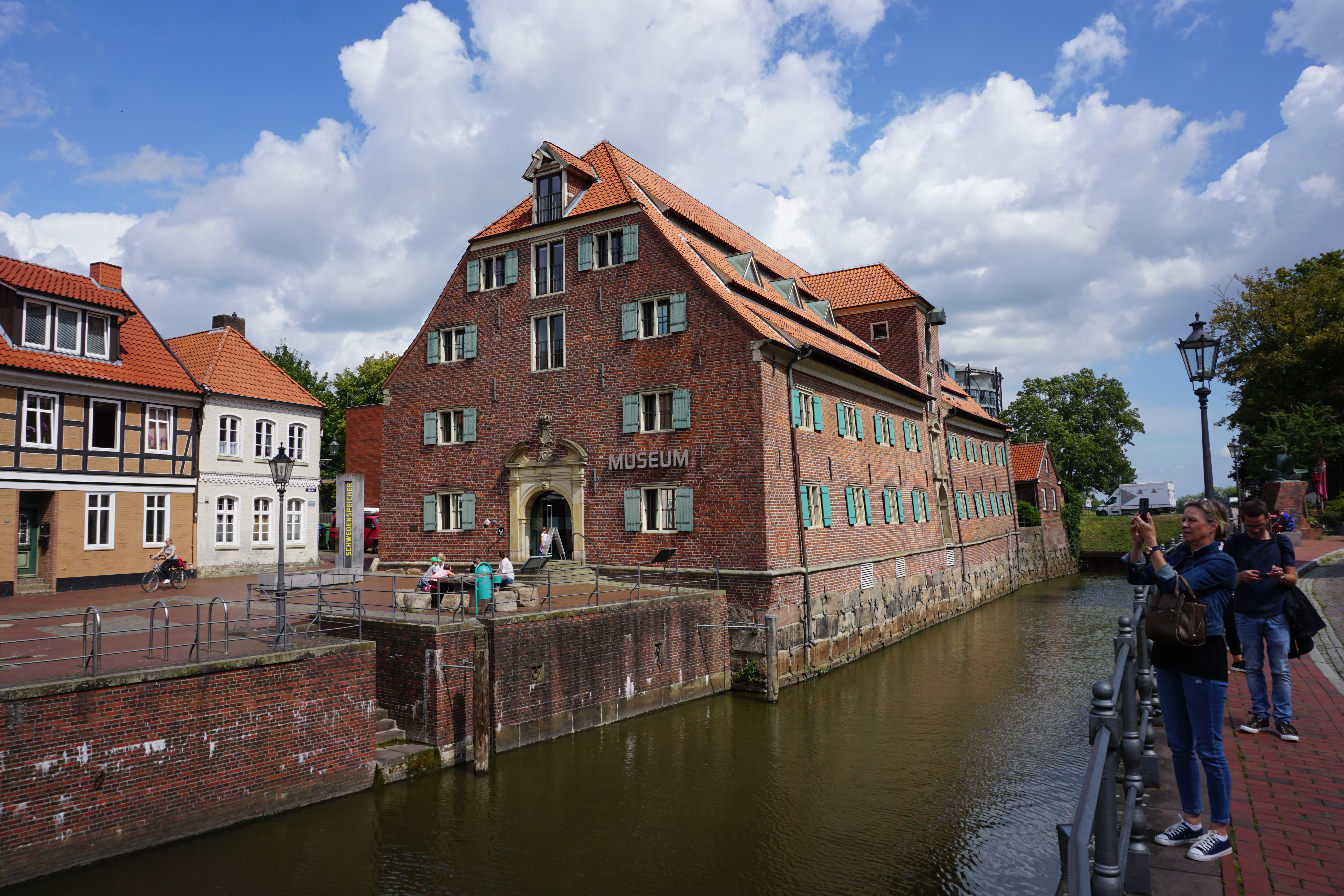 Schwedenspeicher in Stade